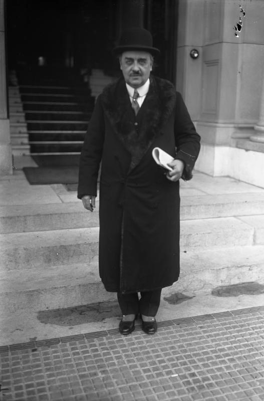 Jean Hennessy, der französische Gesandte in Bern